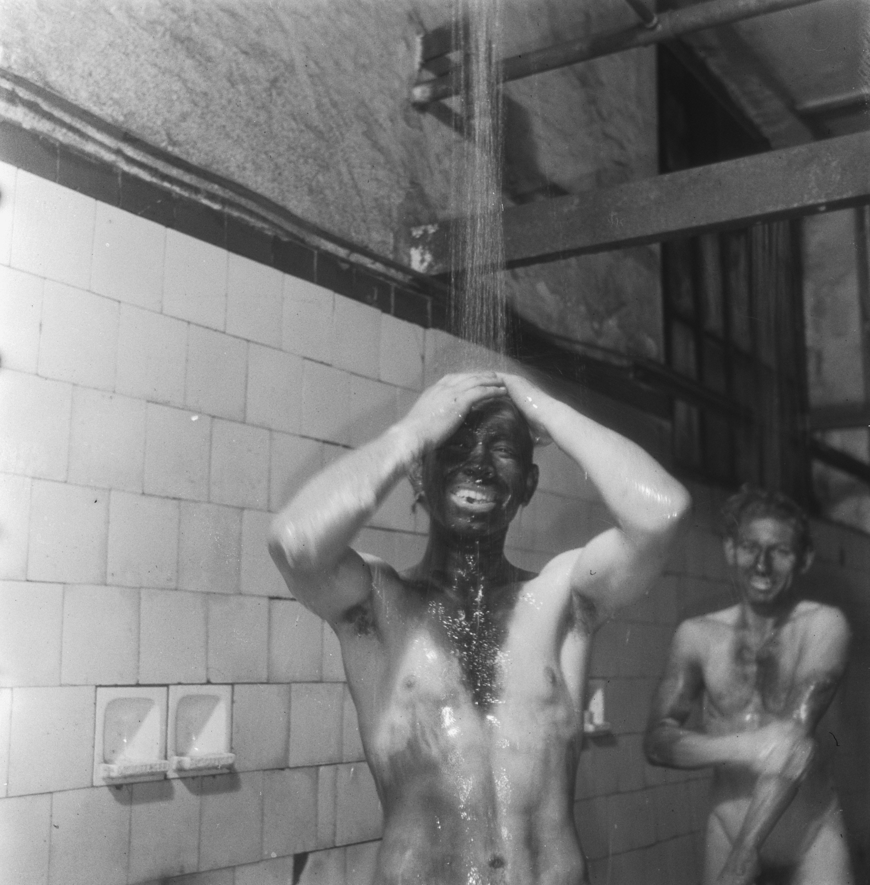 Collectie / Archief : Fotocollectie Anefo Reportage / Serie : Kolenmijnen Limburg Beschrijving : Kolenmijnen Limburg Datum : 21 november 1945 Locatie : Limburg Trefwoorden : mijnbouw, mijnen, mijnwerkers Fotograaf : Taconis, Kryn / Anefo Auteursrechthebbende : Nationaal Archief Materiaalsoort : Negatief (zwart/wit) Nummer archiefinventaris : bekijk toegang 2.24.01.03 Bestanddeelnummer : 901-1105